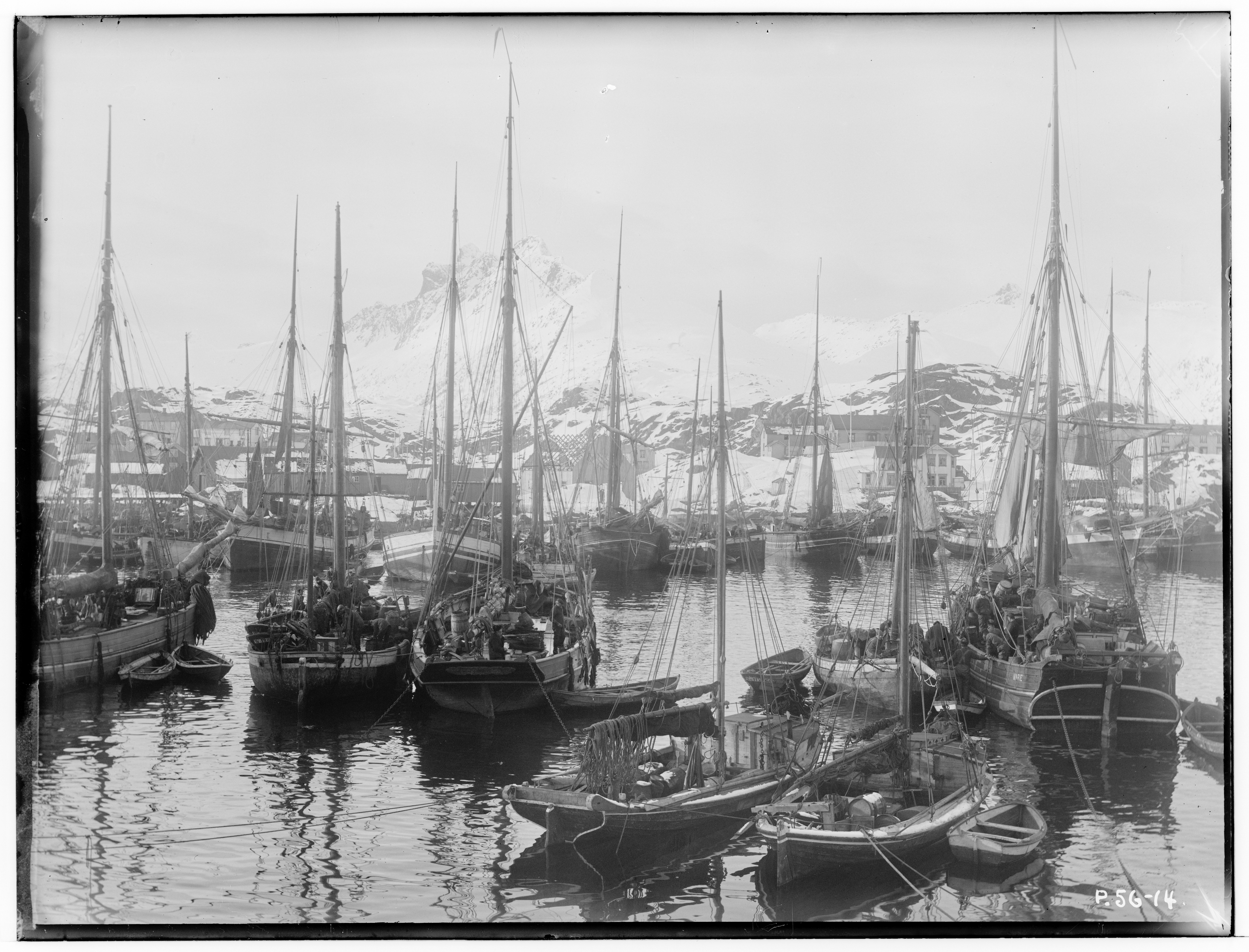 Bildet er hentet fra Arkivverket. Havnen, Svolvær, Nordlands amt Arkivinstitusjon : Riksarkivet Arkivnavn : Havnedirektoratet Sted : Norge, Nordland, Vågan, Emneord: Havn, Båter, Fjell Avbildet